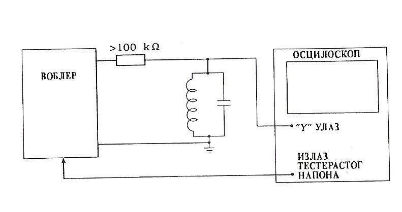 druga slika